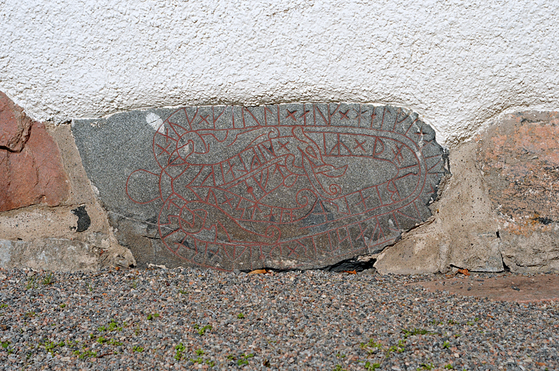 Runsten inmurad i Stigtomta kyrka. Runinskrift 48.